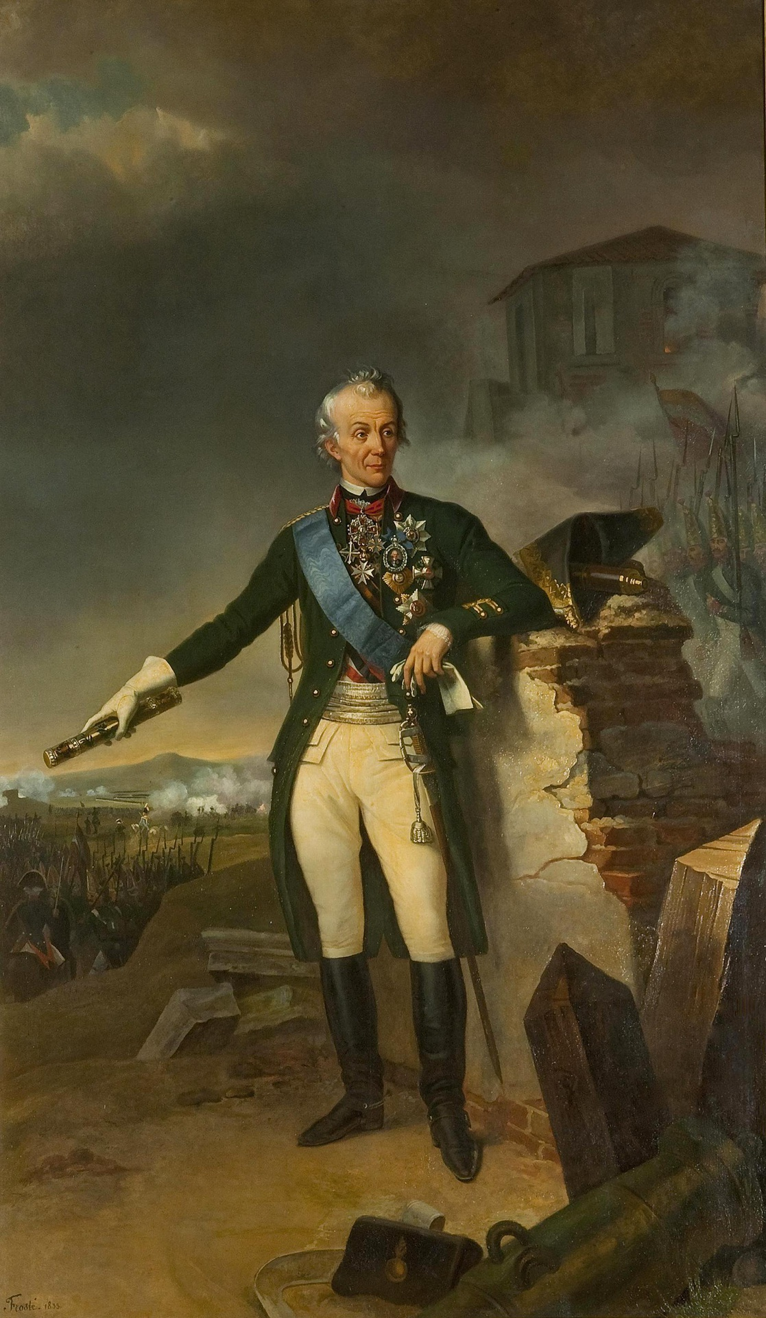 Генерал-фельдмаршал А. В. Суворов.